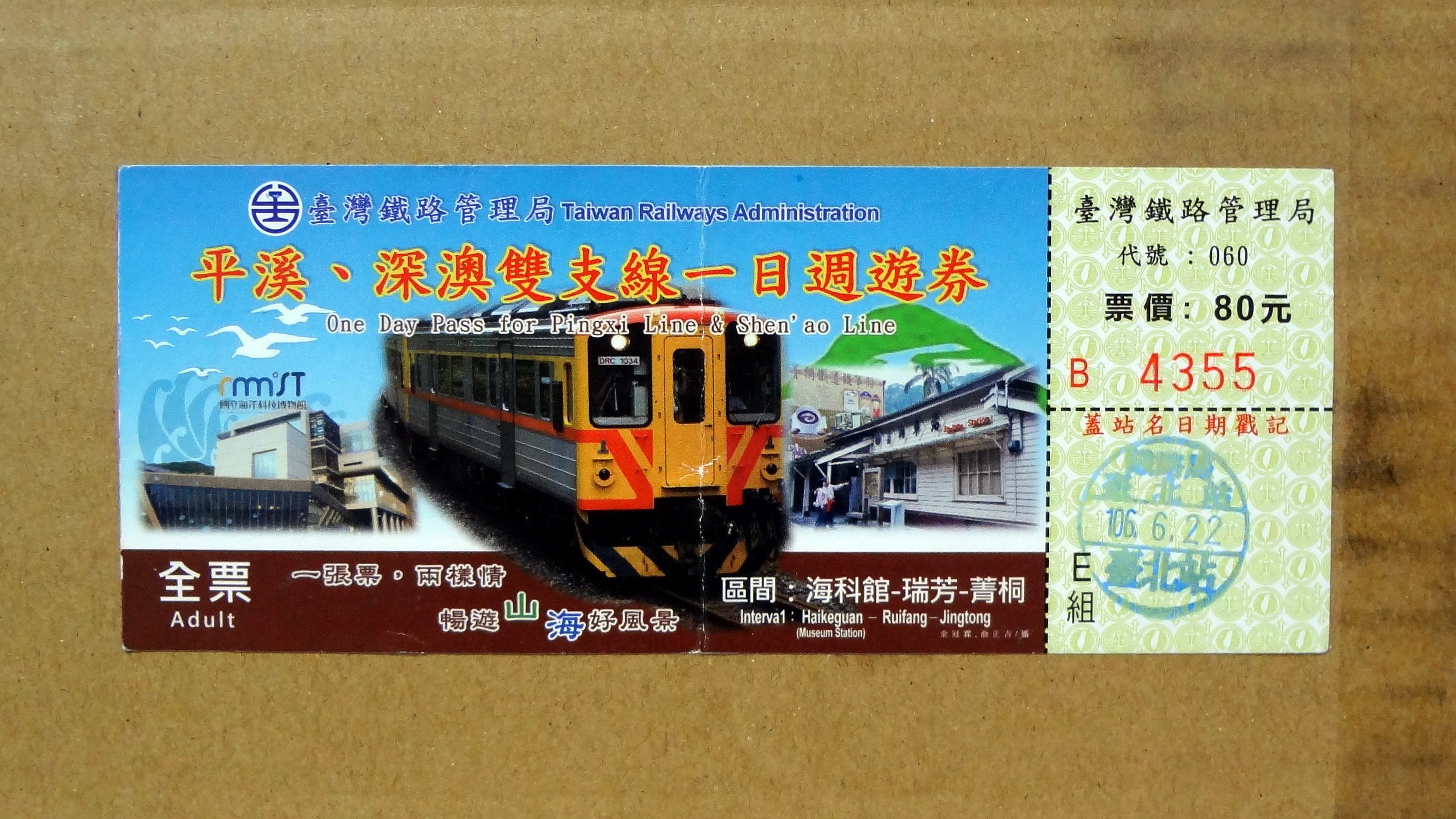 中文（台灣）: 臺灣鐵路管理局平溪線、深澳線一日週遊券全票，票價新臺幣80元。